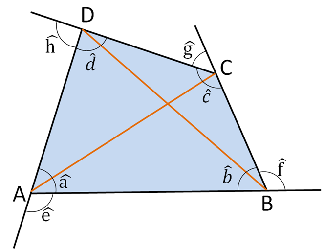 Quadrilátero qualquer